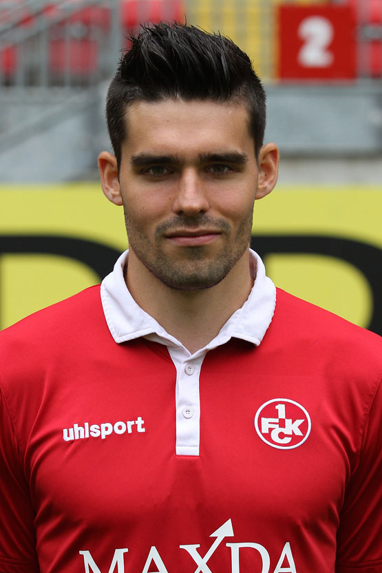 Sascha Mockenhaupt